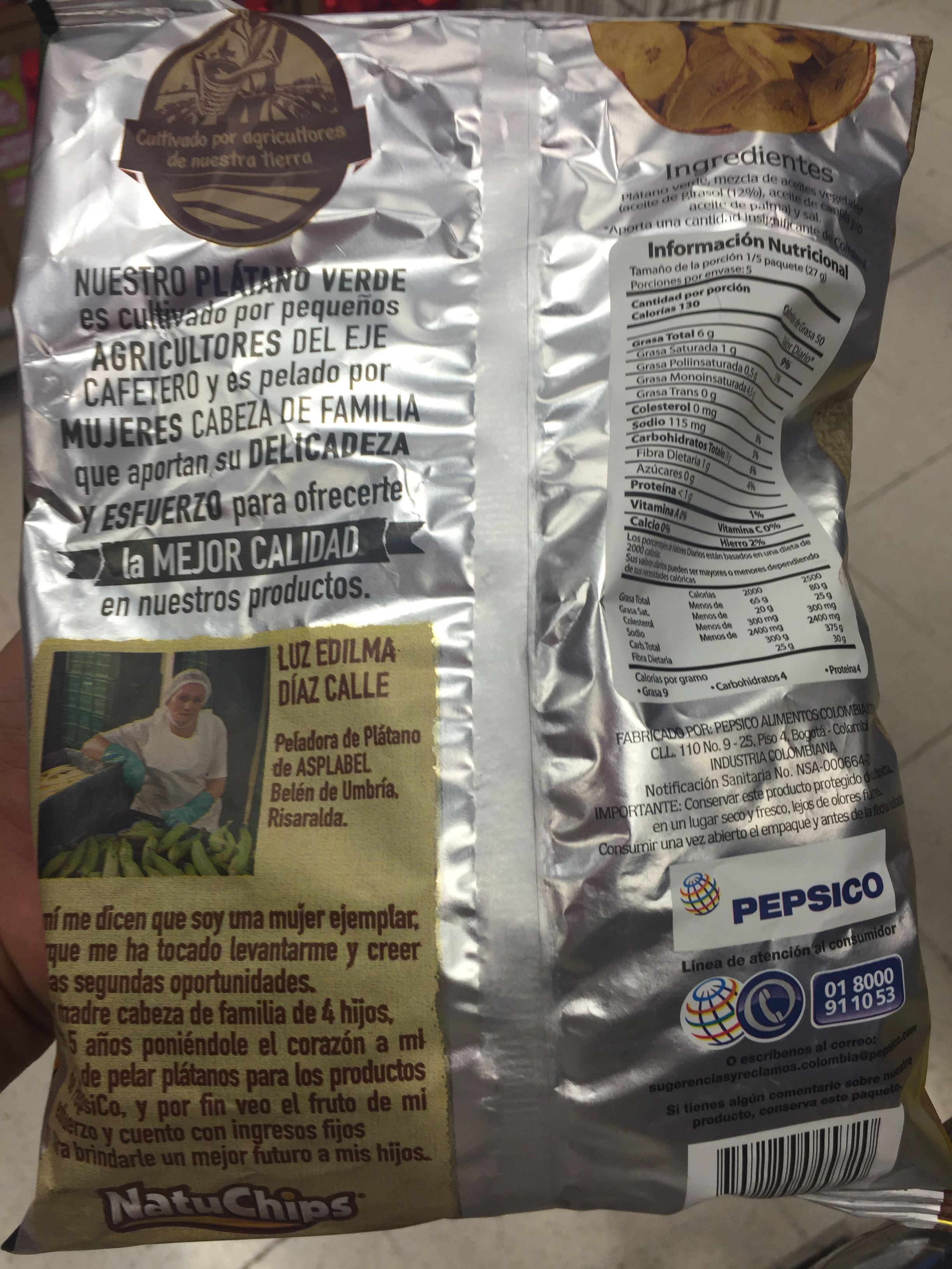 Paquete de platanitos Asplabel